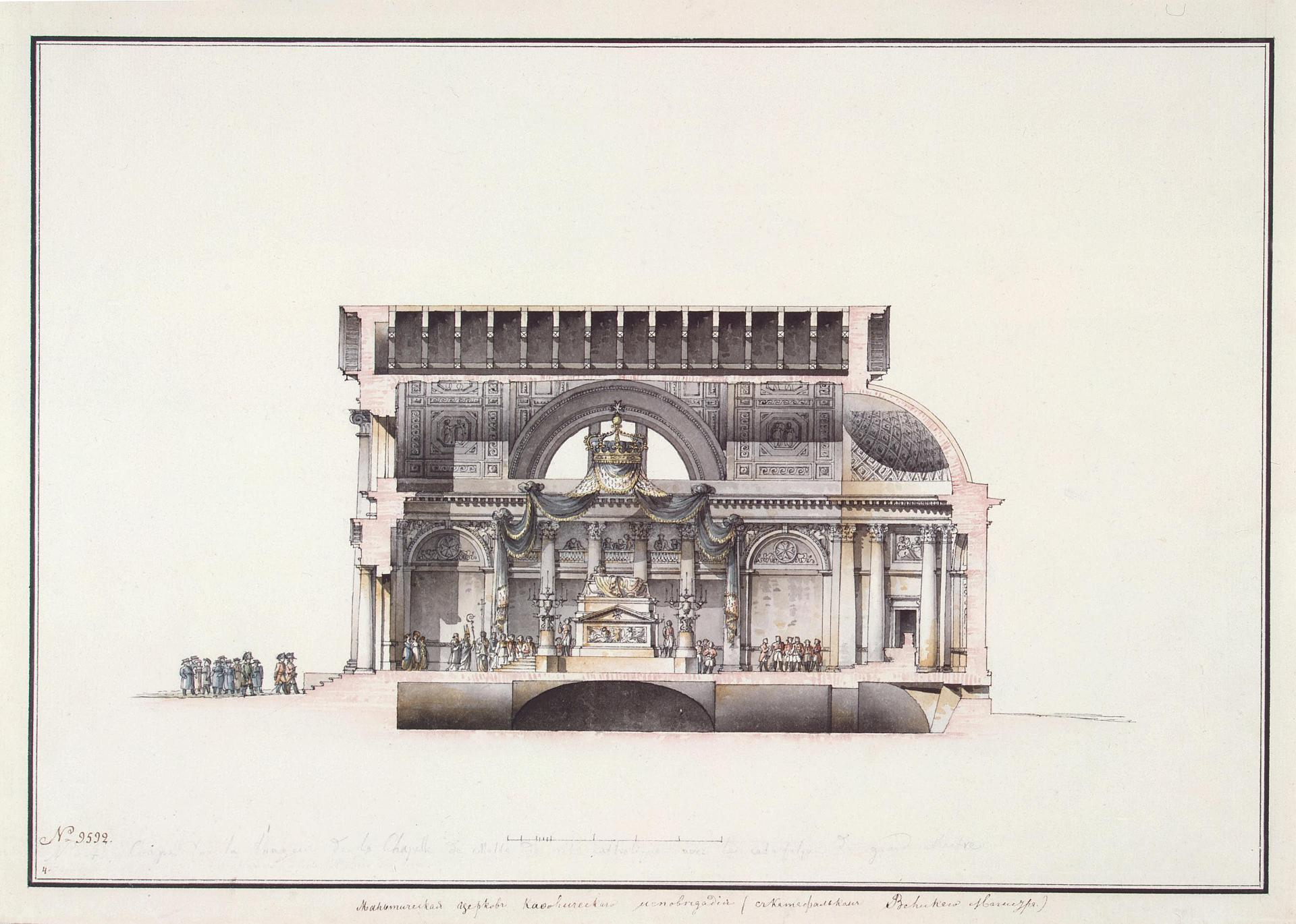 Мальтийская капелла в Санкт-Петербурге. Продольный разрез по главной оси с изображением катафалка императора Павла I. Бумага, перо, кисть, тушь, акварель; 35x49,7 см; ГЭ, инв. ОР-9592